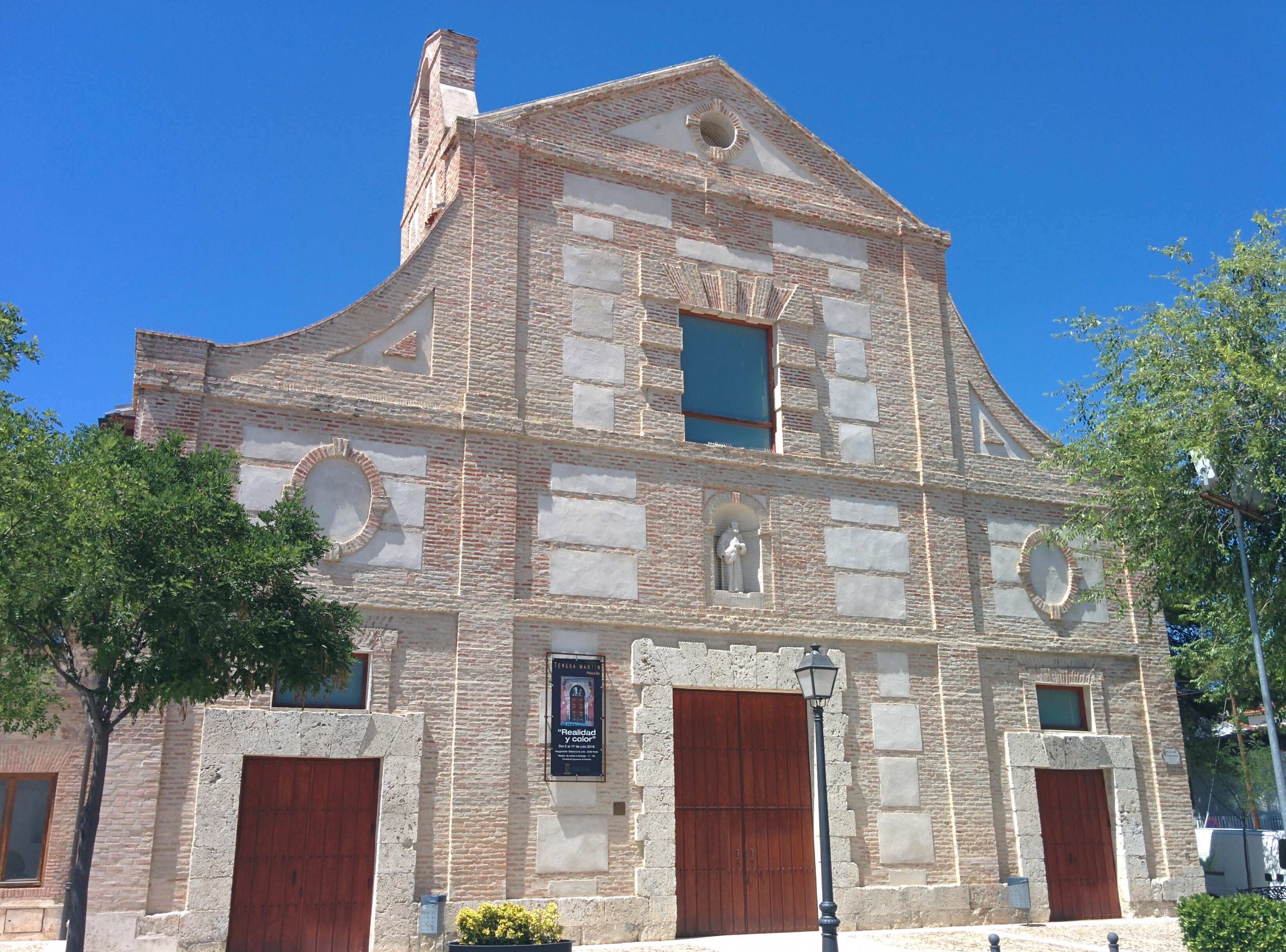 Convento de los Capuchinos en Esquivias (Toledo, España).